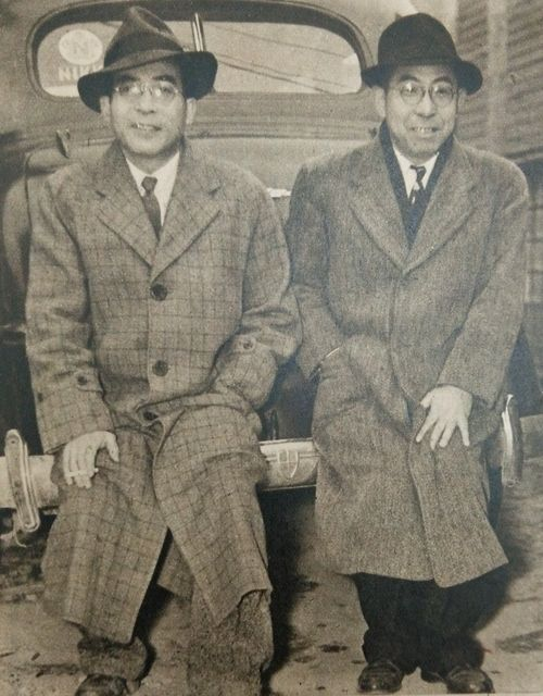 今日出海（左）と小国英雄（右）